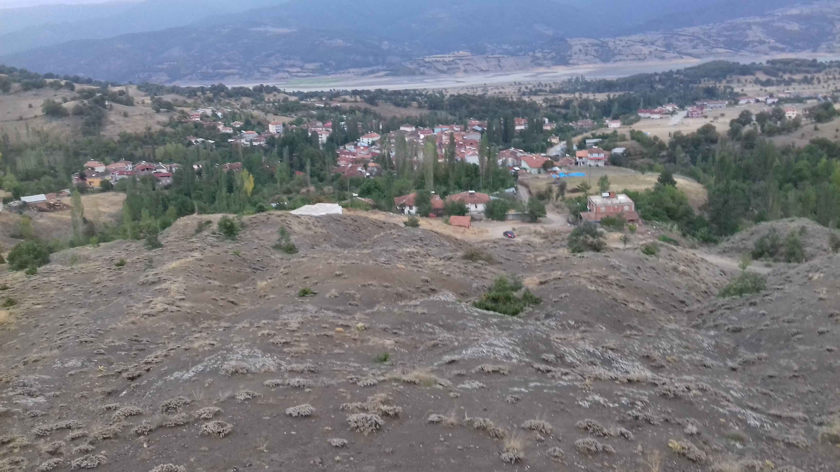 Akarçay Galeri